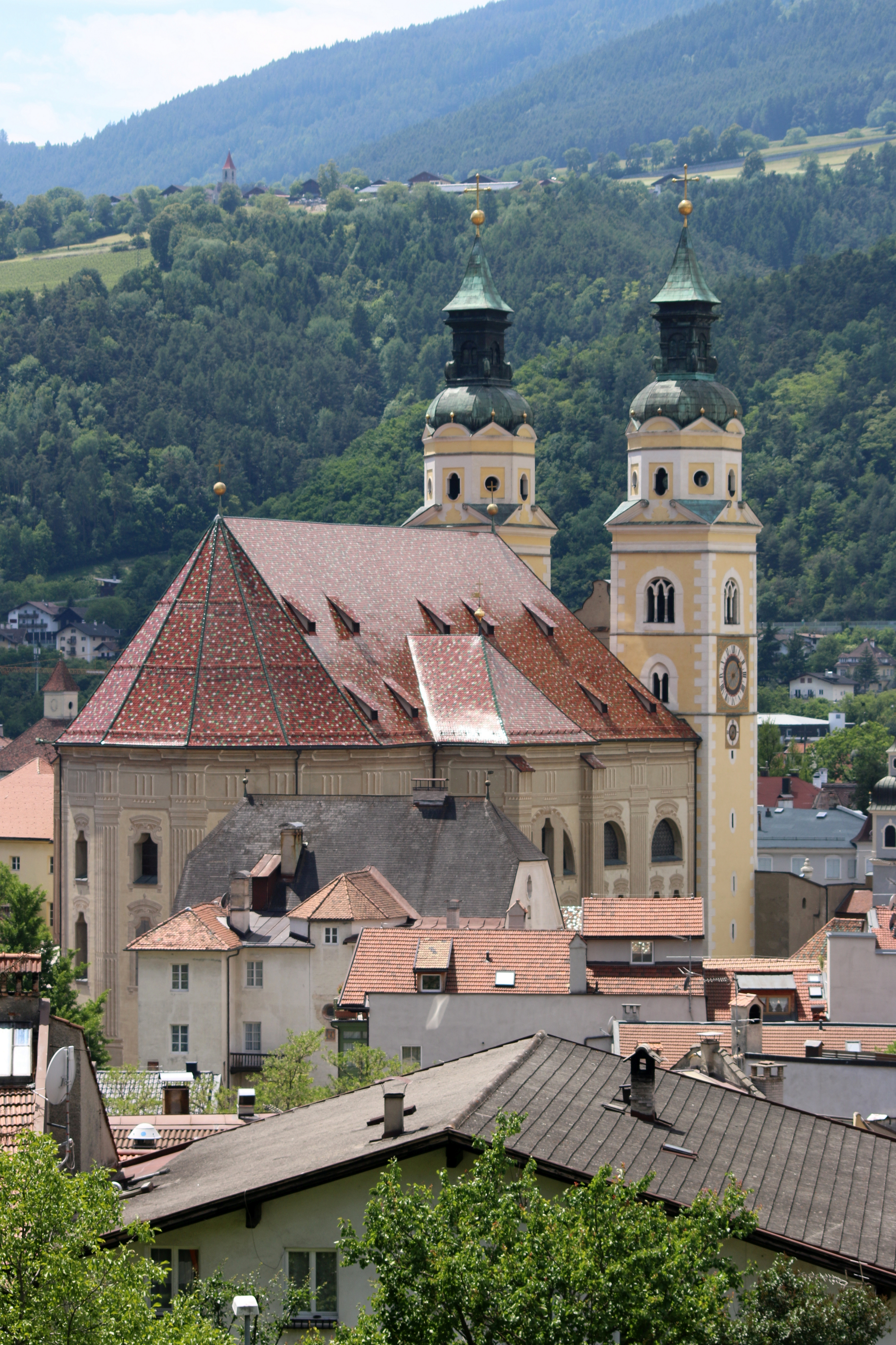 Brixen, Südtirol: Brixener Dom Mariä Himmelfahrt